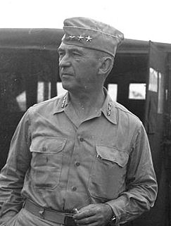 גנרל וולטר קרוגר